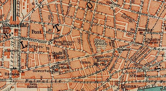 Map of Altona, Große Bergstraße Germany, 1910